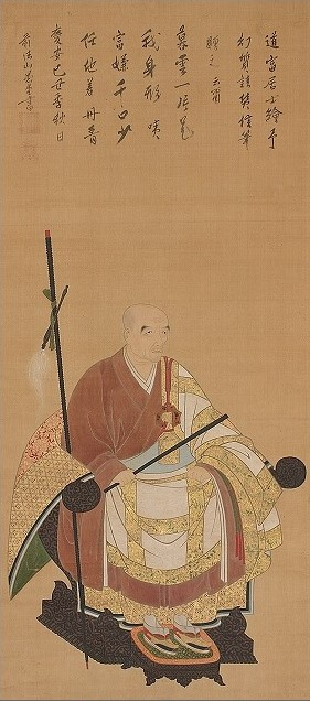 愚堂東寔の頂相。